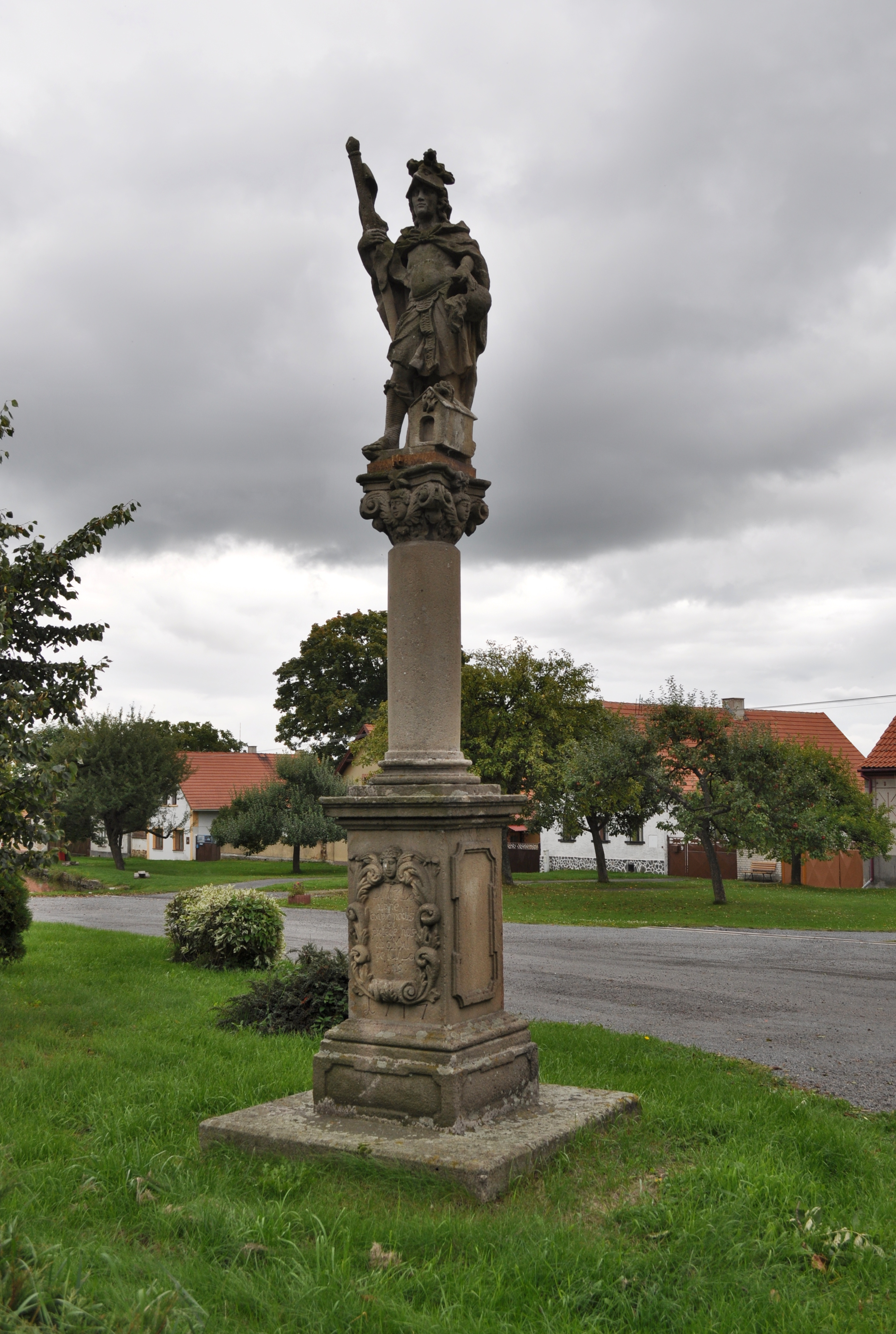 Socha sv. Floriána, Vysoká Libyně